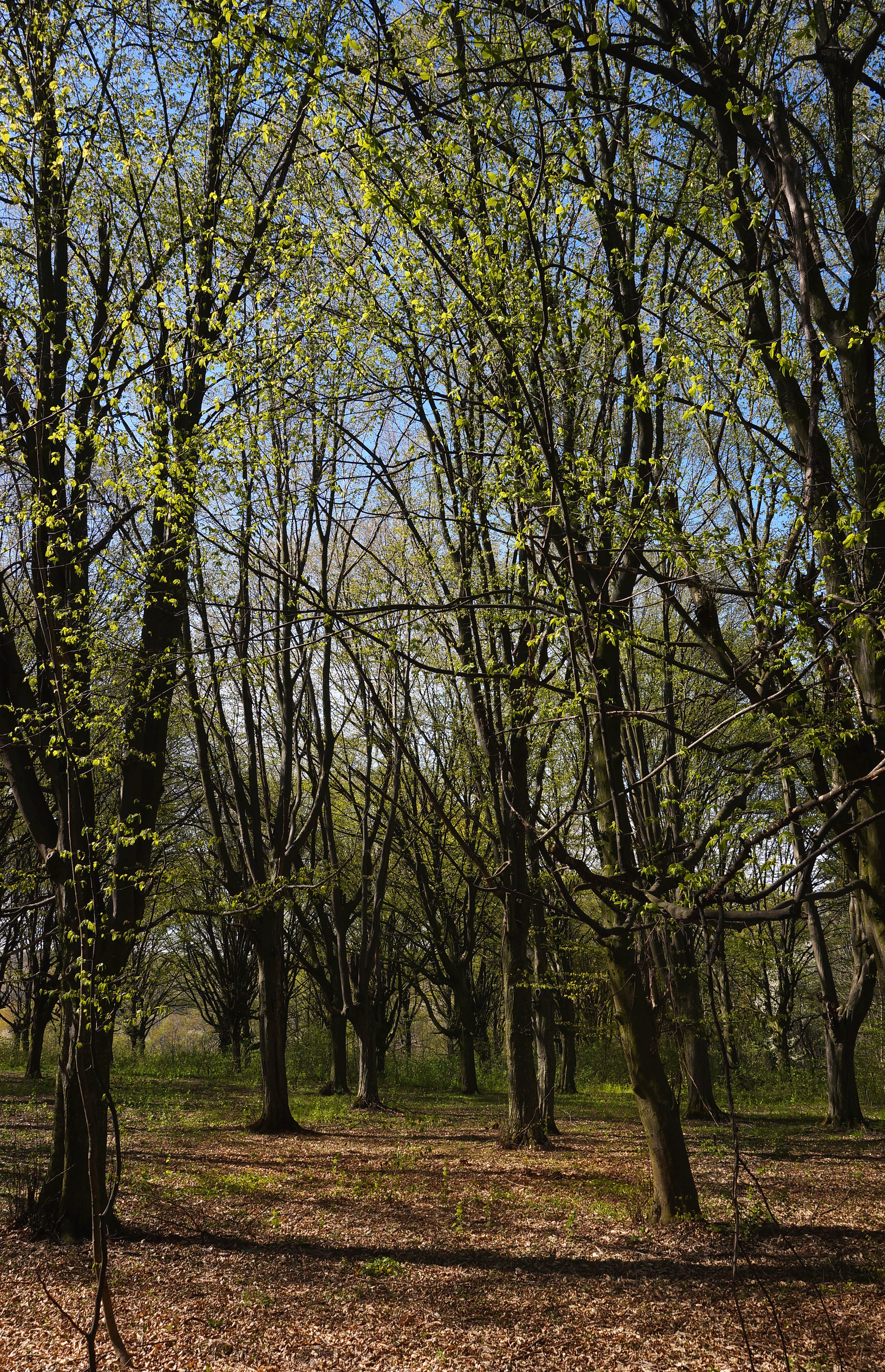 Липник, Деражнянський район, ліс біля с. Слобідка Шелехівська